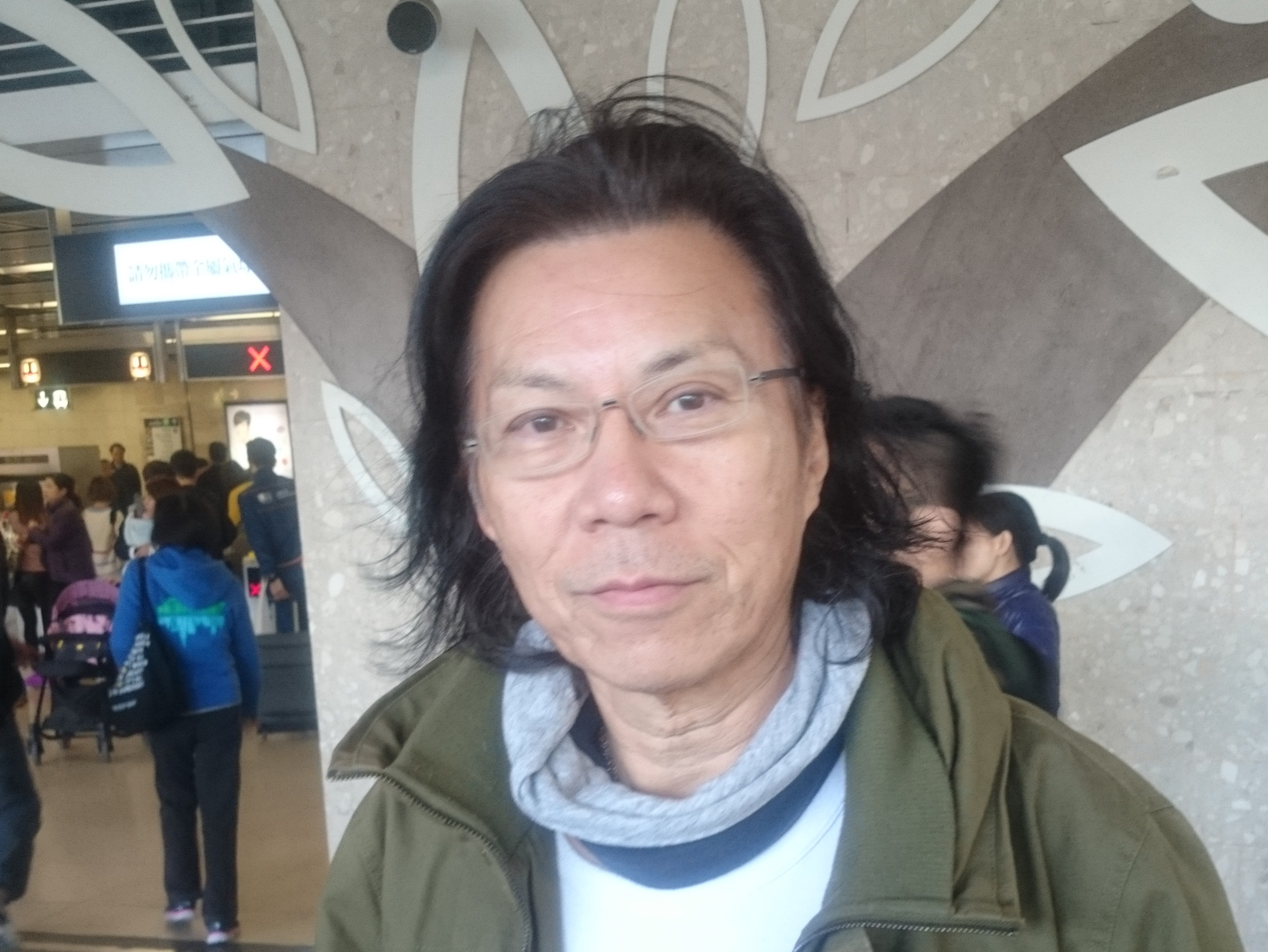 粵語: 2017年12月16號，黃國桐喺沙田地鐵站出面。